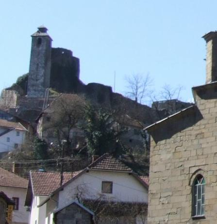 Maglajska Gradina sa trga